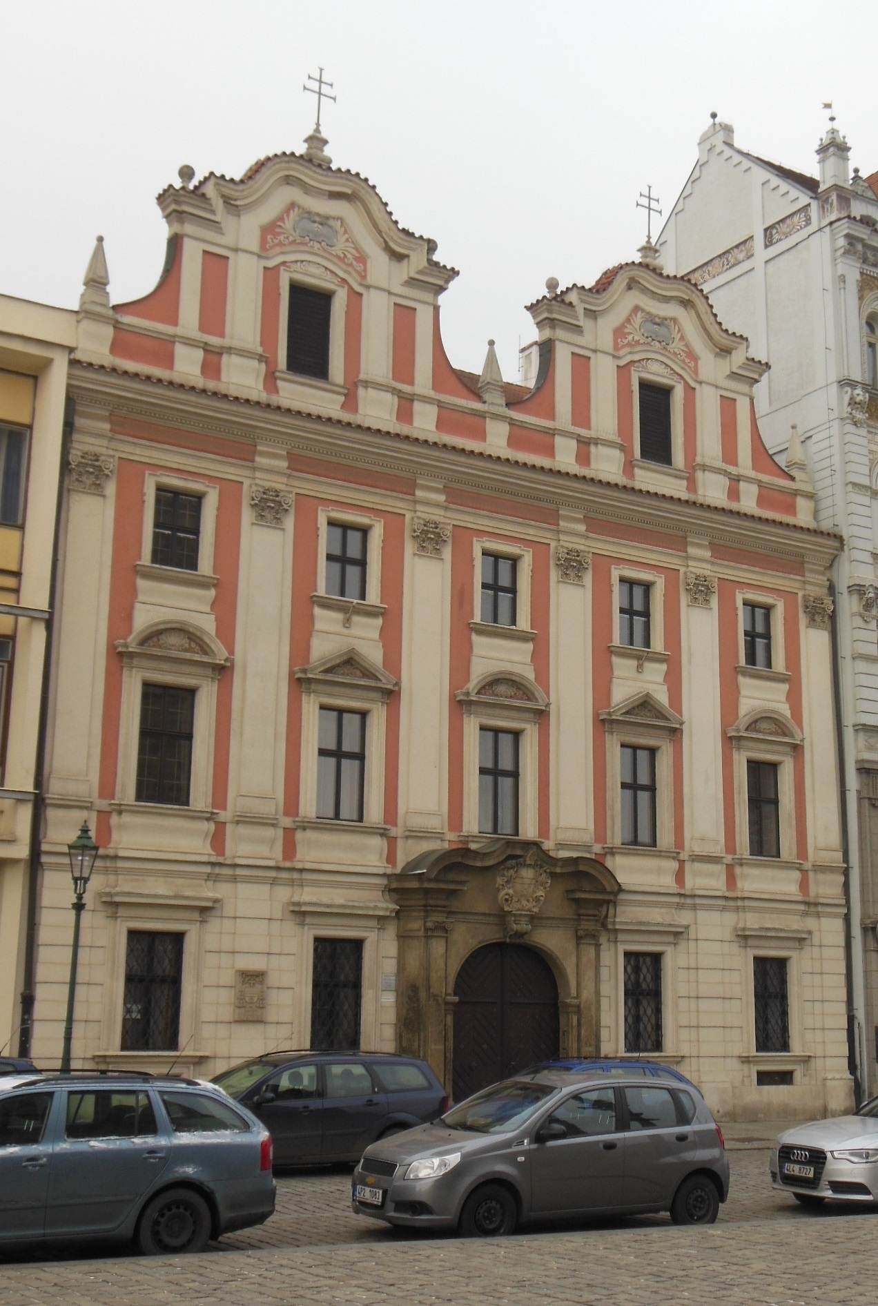 Bývalé arciděkanství č. p. 234/35 na náměstí Republiky v Plzni-Vnitřním Městě.